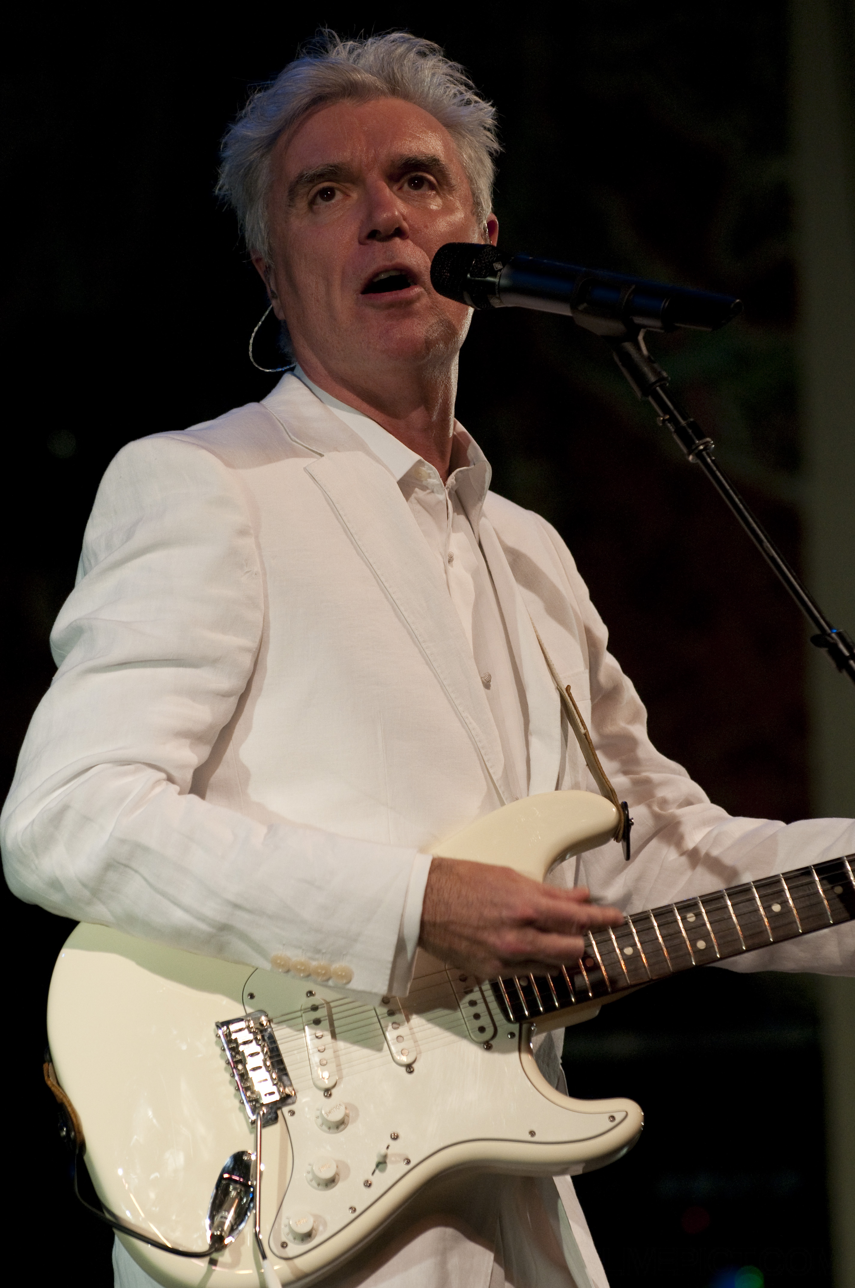 David Byrne